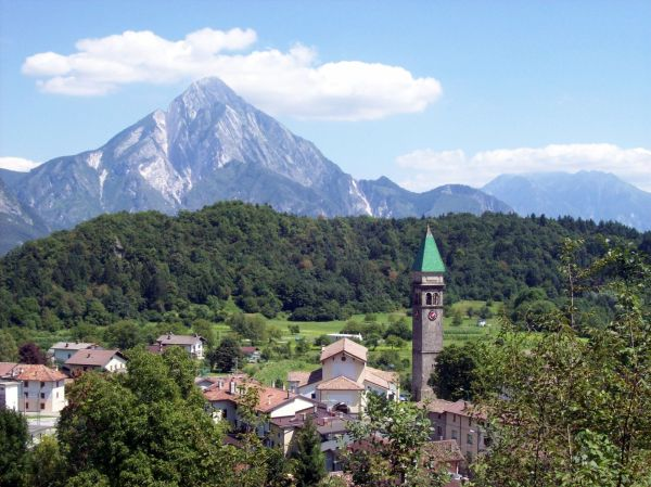 Verzegnis (UD), la frazione di Villa